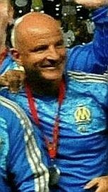 De gauche à droite : Antonio Pintus, Didier Deschamps, Nicolas Dehon, Guy Stéphan vainqueurs du Trophée des champions 2011 avec l'Olympique de Marseille.